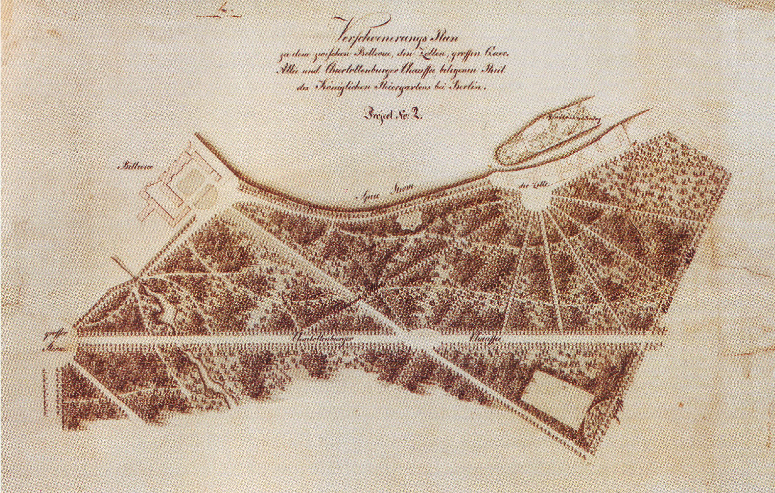 "Verschoenerungs Plan zu dem zwischen Bellevue, den Zelten, grossen Quer-Allée und Charlottenburger Chaussee belegenen Theil des Königlichen Thiergartens bei Berlin"; redesign plan by Peter Joseph Lenné for Tiergarten park in Berlin, drawn by Gerhard Koeber, quill, pencil and watercolor, 43,3x58,8cm, Landesarchiv Berlin